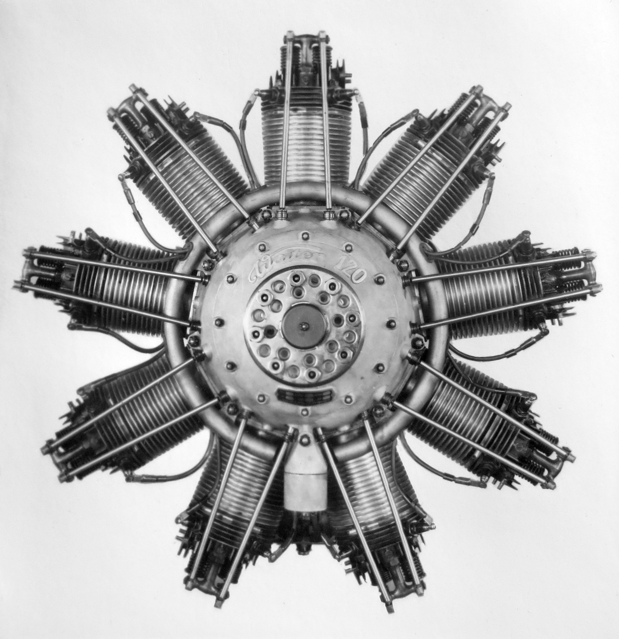 letecký motor Walter NZ-120